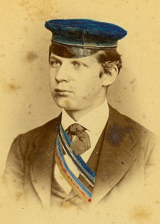 Porträtfotografie von Louis Viereck